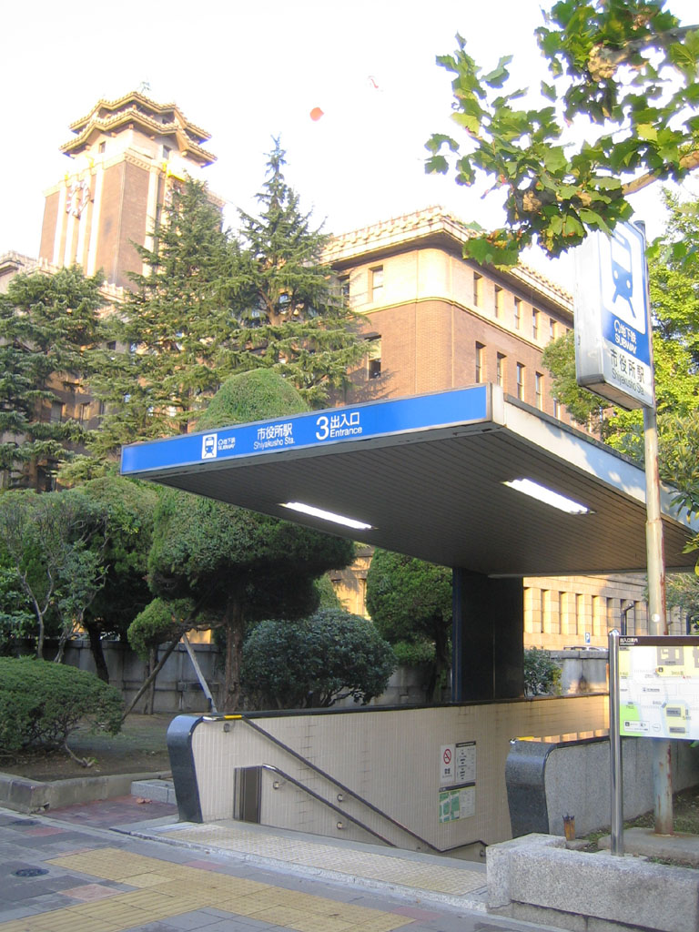 Shiyakusho Station (市役所駅), Gate No.3, in Nagoya, Aichi, Japan